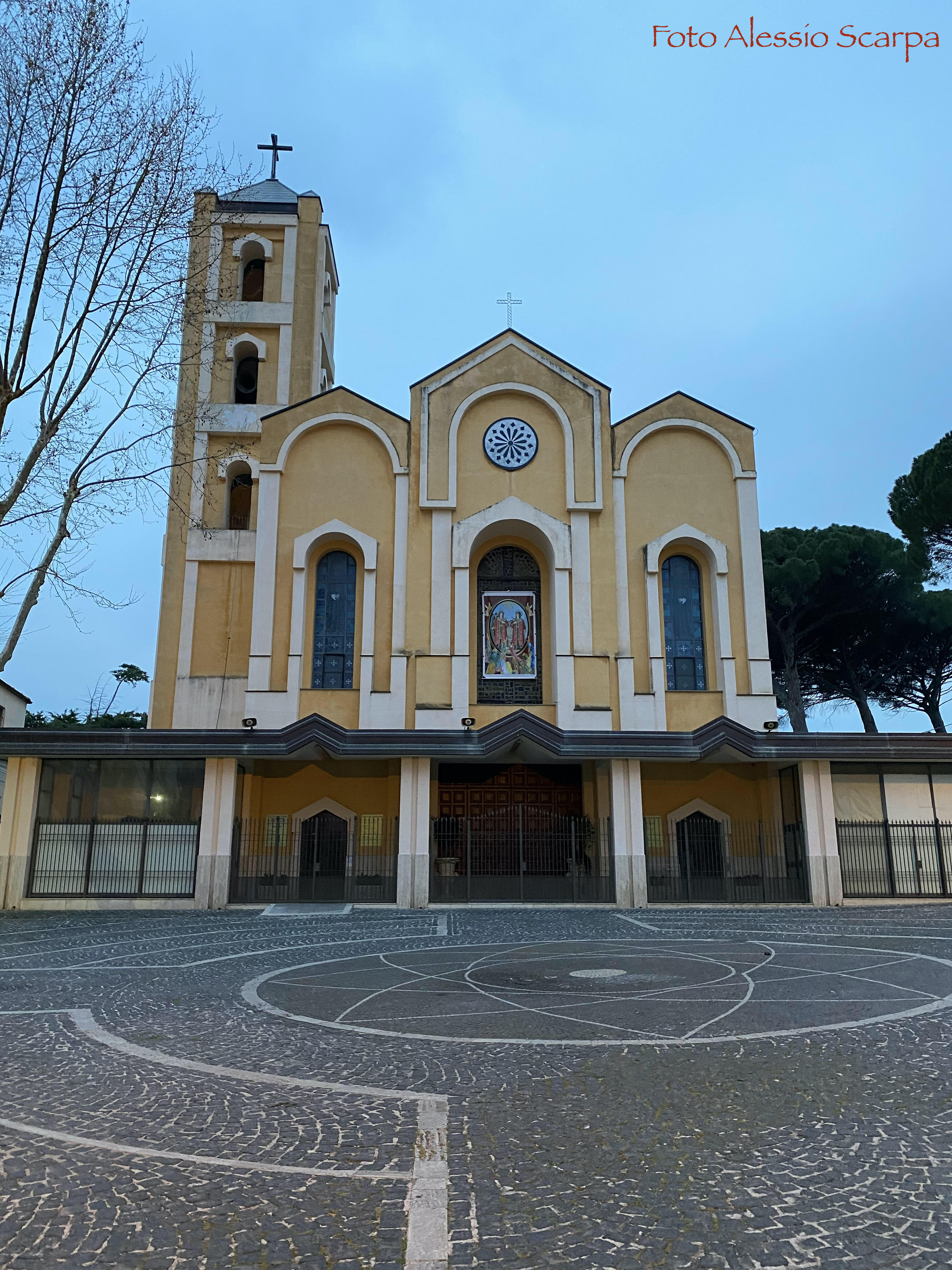 Santuario Santi Cosma e Damiano Eboli